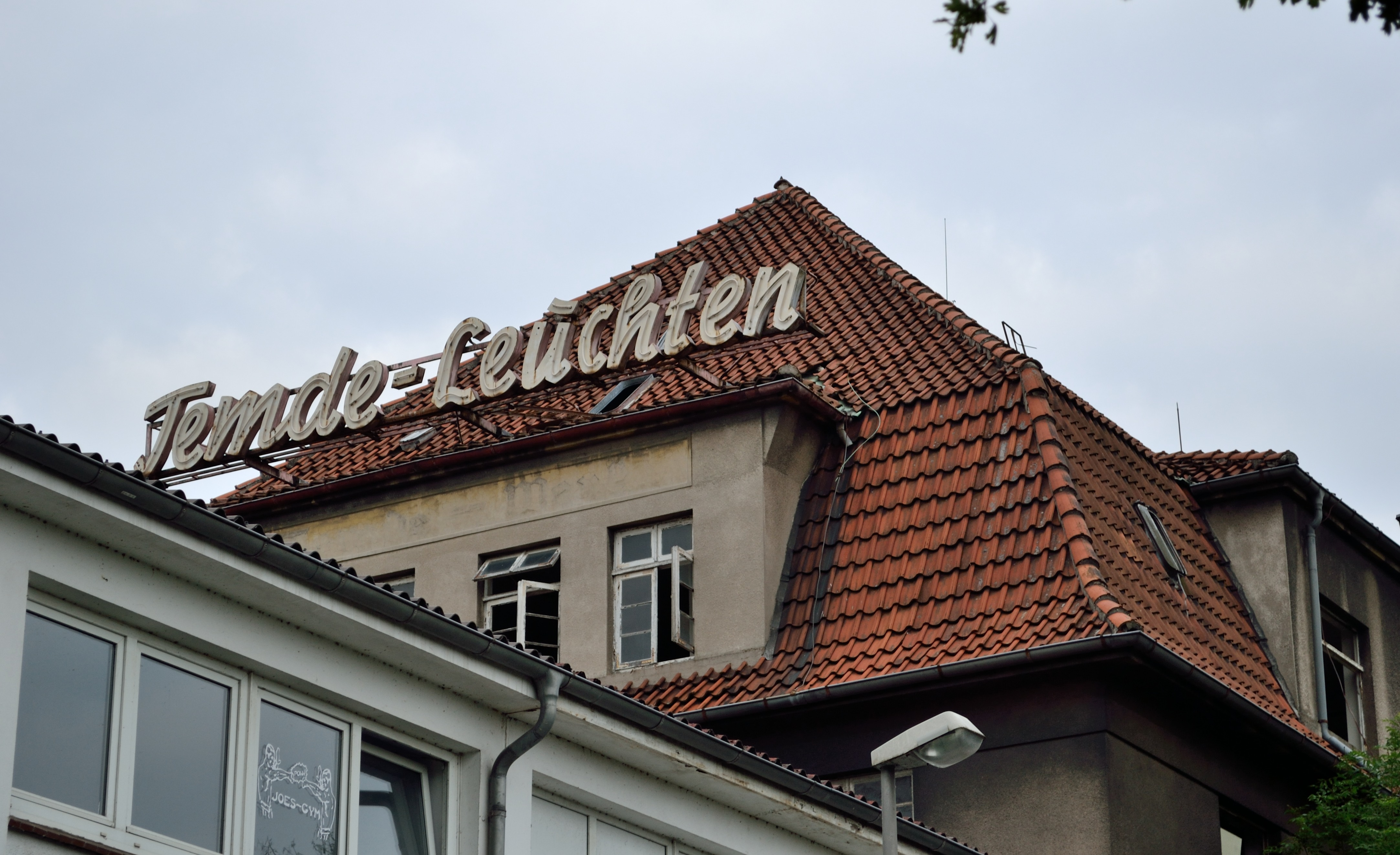 Ruine der ehemaligen Firma Temde-Leuchten in Detmold (aus Nord-Osten)